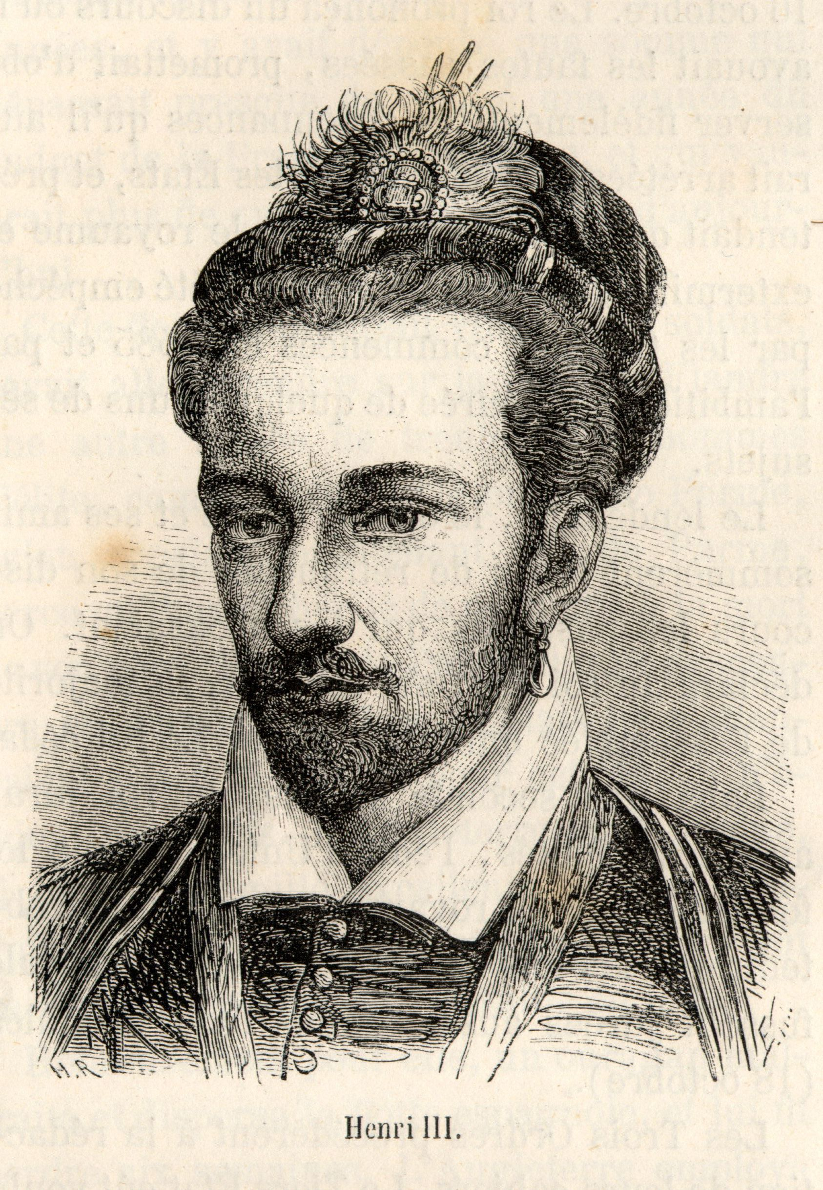 Henri III